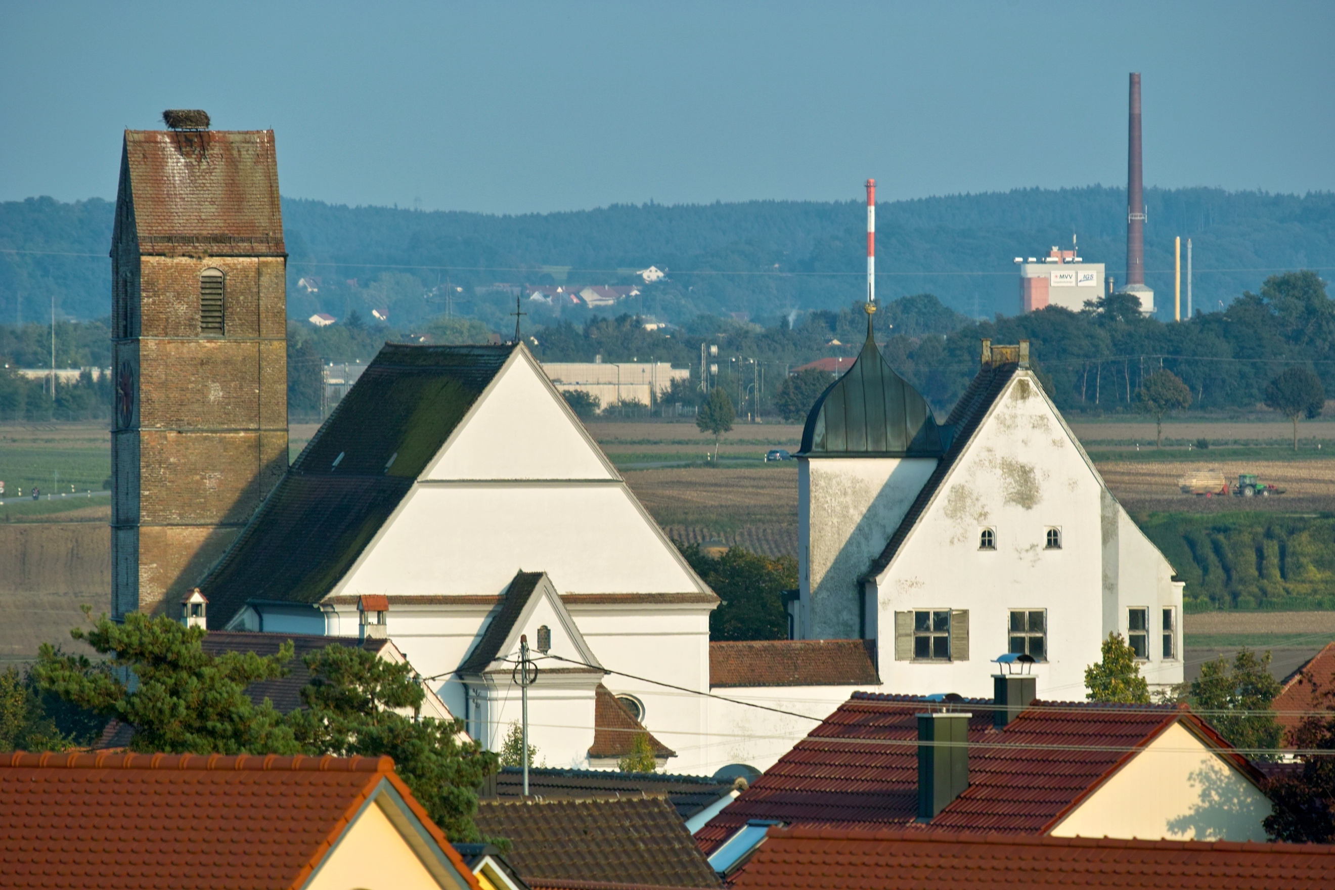 Ensemble Pfarrkirche St.Martin mit spätgotischem Fuggerschloss über den Dächern von Gablingen. Blick von der Nordwestseite